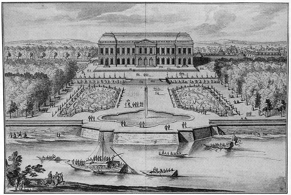 Sujet : Le château de Choisy au temps de la Grande Mademoiselle